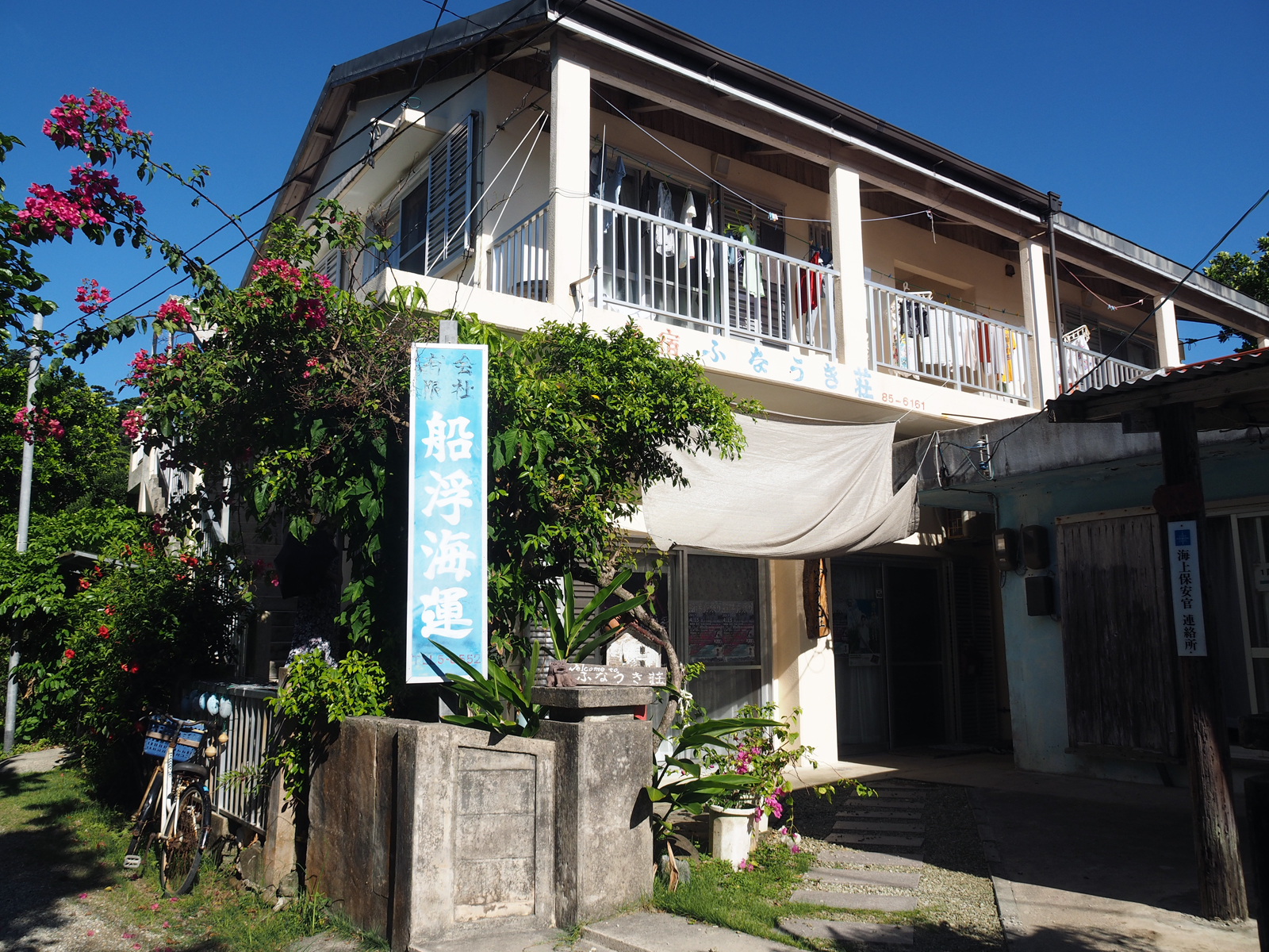 船浮海運船浮事務所（沖縄県八重山郡竹富町西表島船浮）